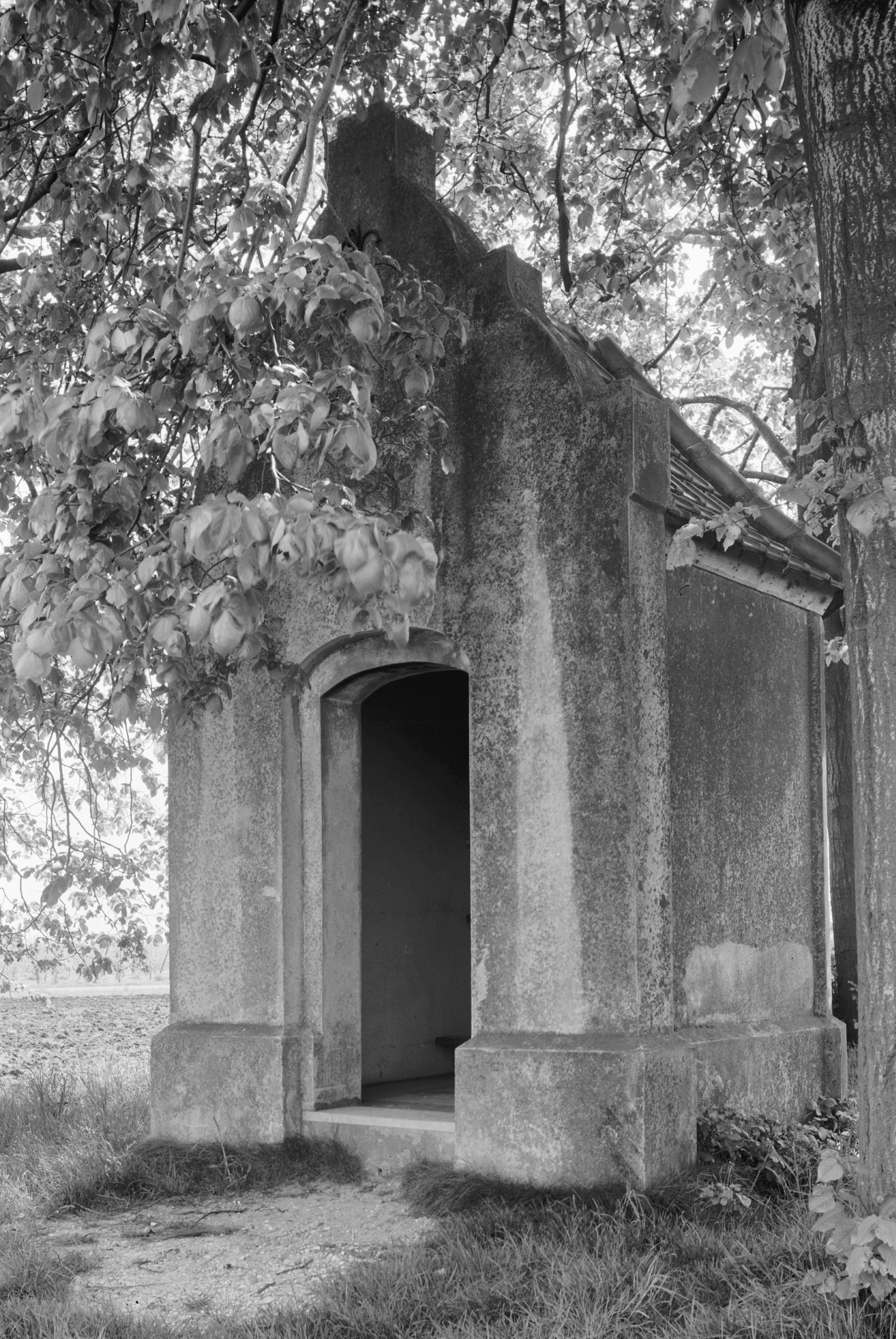 Onze Lieve Vrouwe Kapel, Frankrijkweg